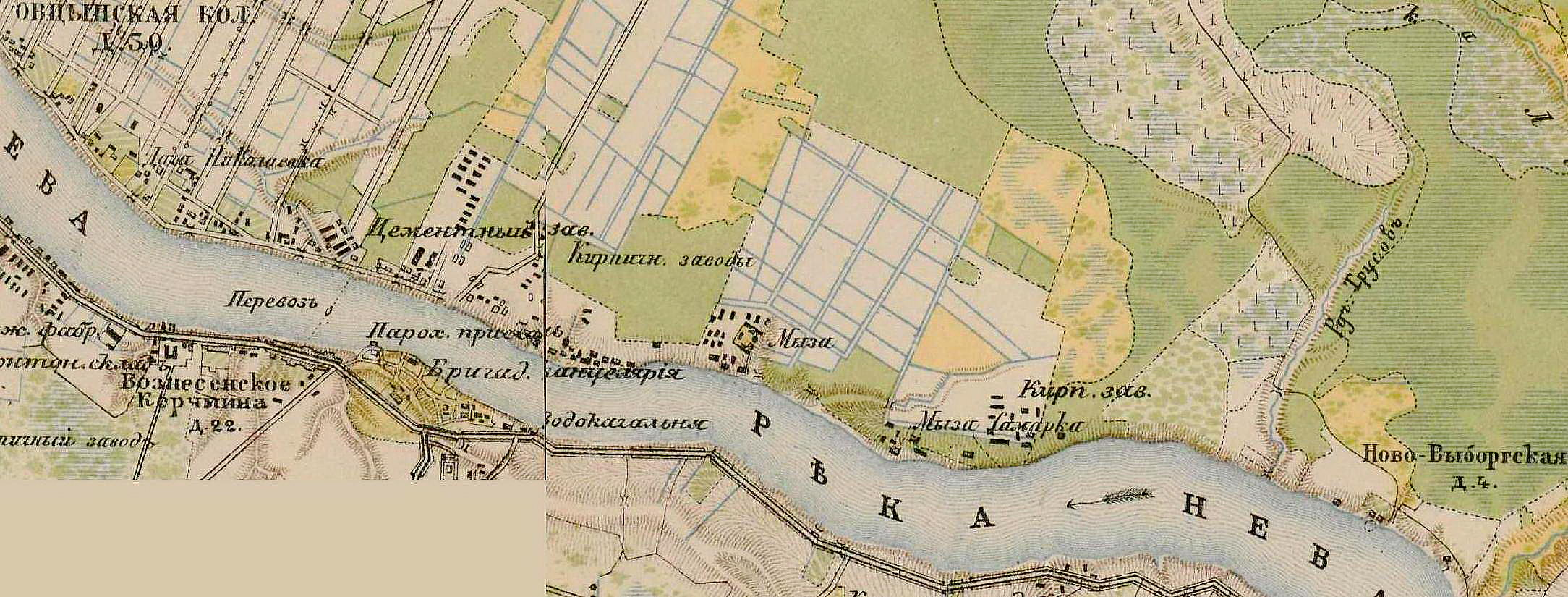 План деревнь и мыз на месте будущего посёлка имени Свердлова. 1885 г.